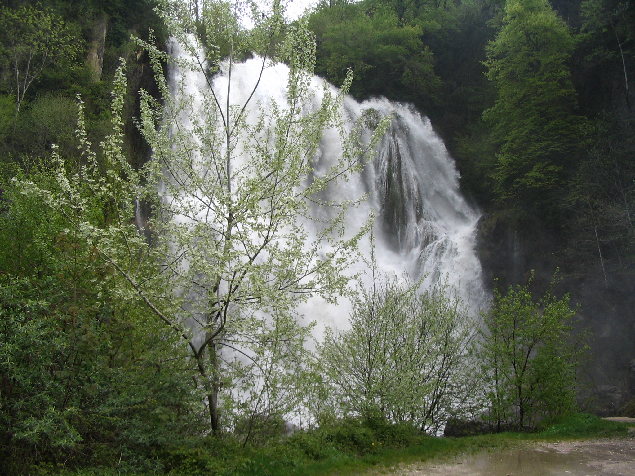 Cascade de Glandieu à plein débit de fonte des neiges (mai). Cette cascade haute de 60 mètres est située à la frontière des communes de Brégnier-Cordon et de Saint-Benoît dans l'Ain.